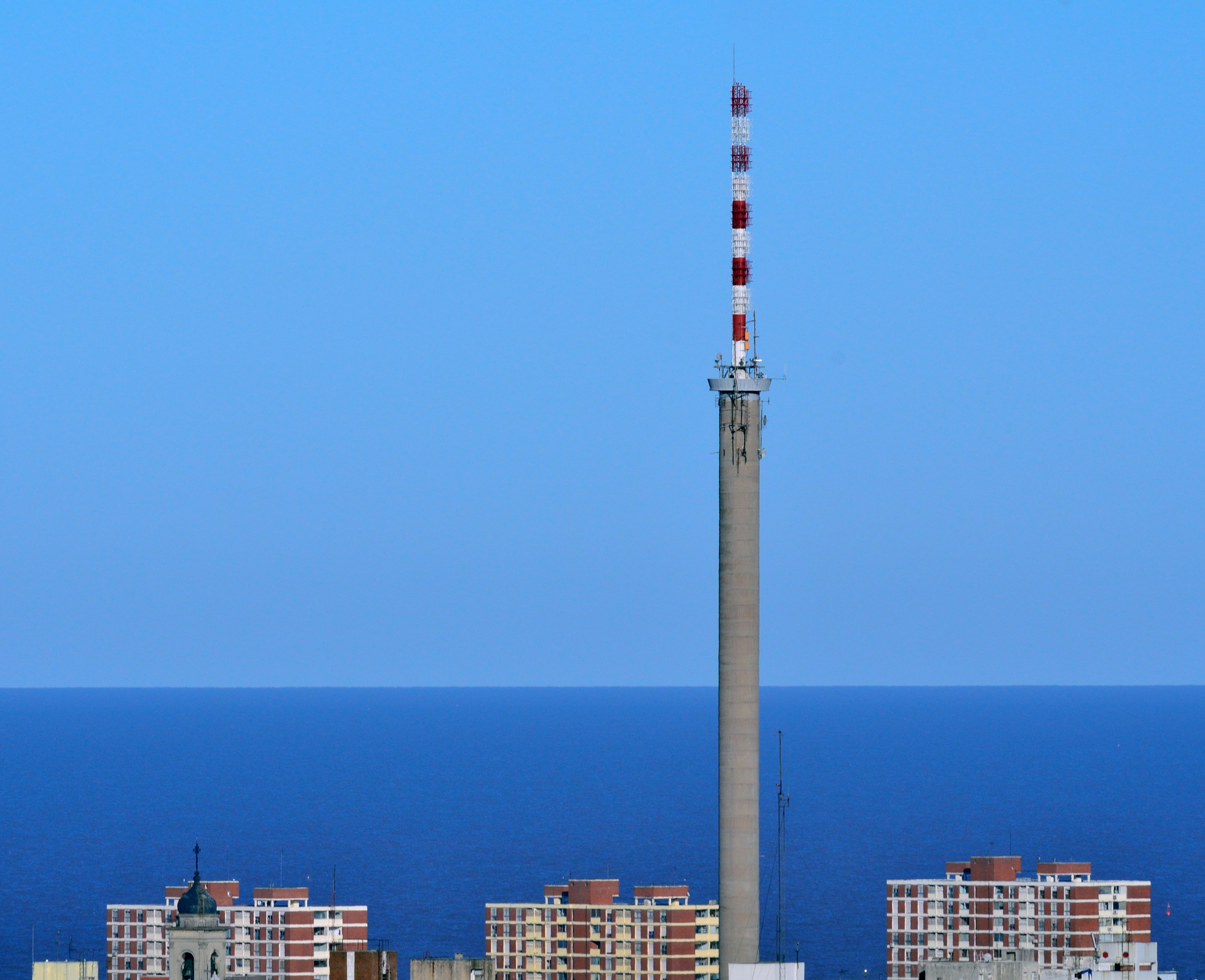 Antenas de canales 10 y 12 en Montevideo, Uruguay.